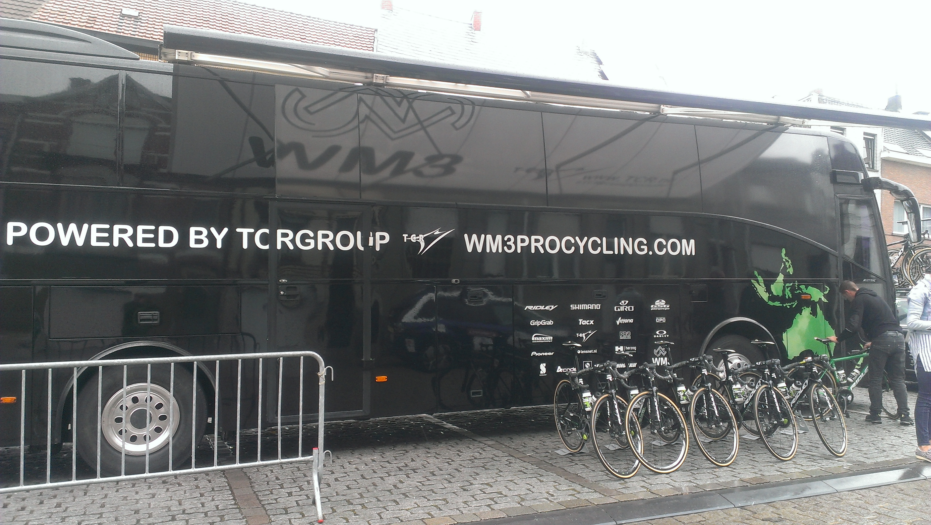 Start van de 3e en laatste etappe van de Lotto Belgium Tour 2017 in Geraardsbergen.